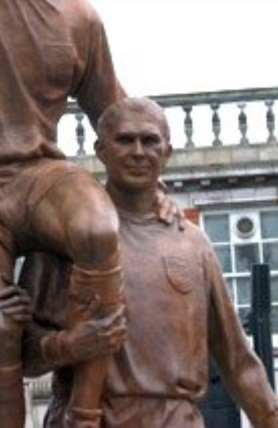 Estatua de Ray Wilson en el Upton Park